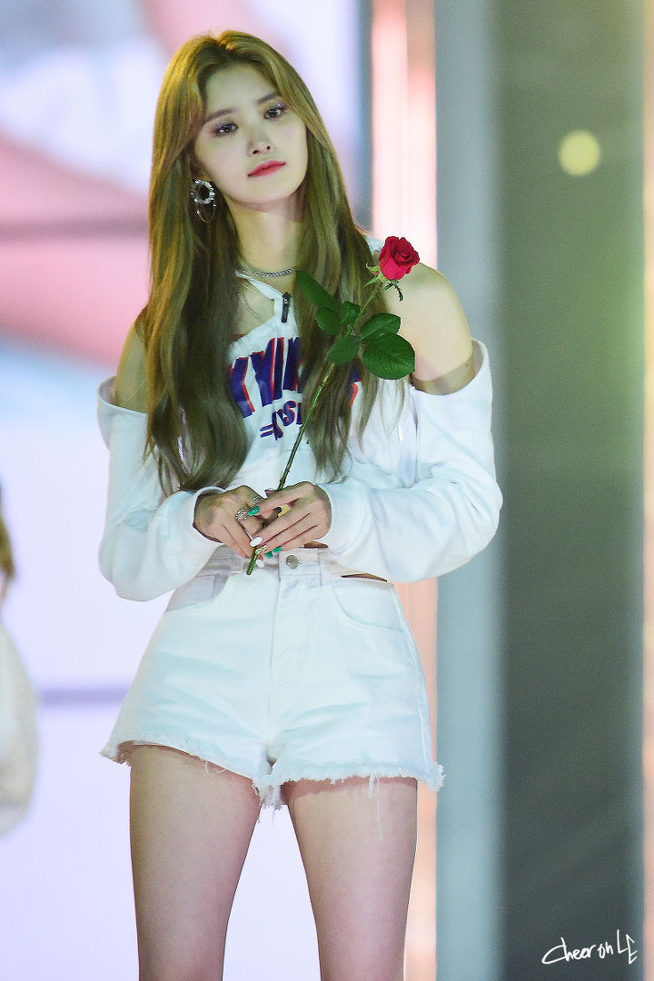 180802 2018 코리아 뮤직 페스티벌(KMF) 고척돔 EXID 정화 직찍 (2)